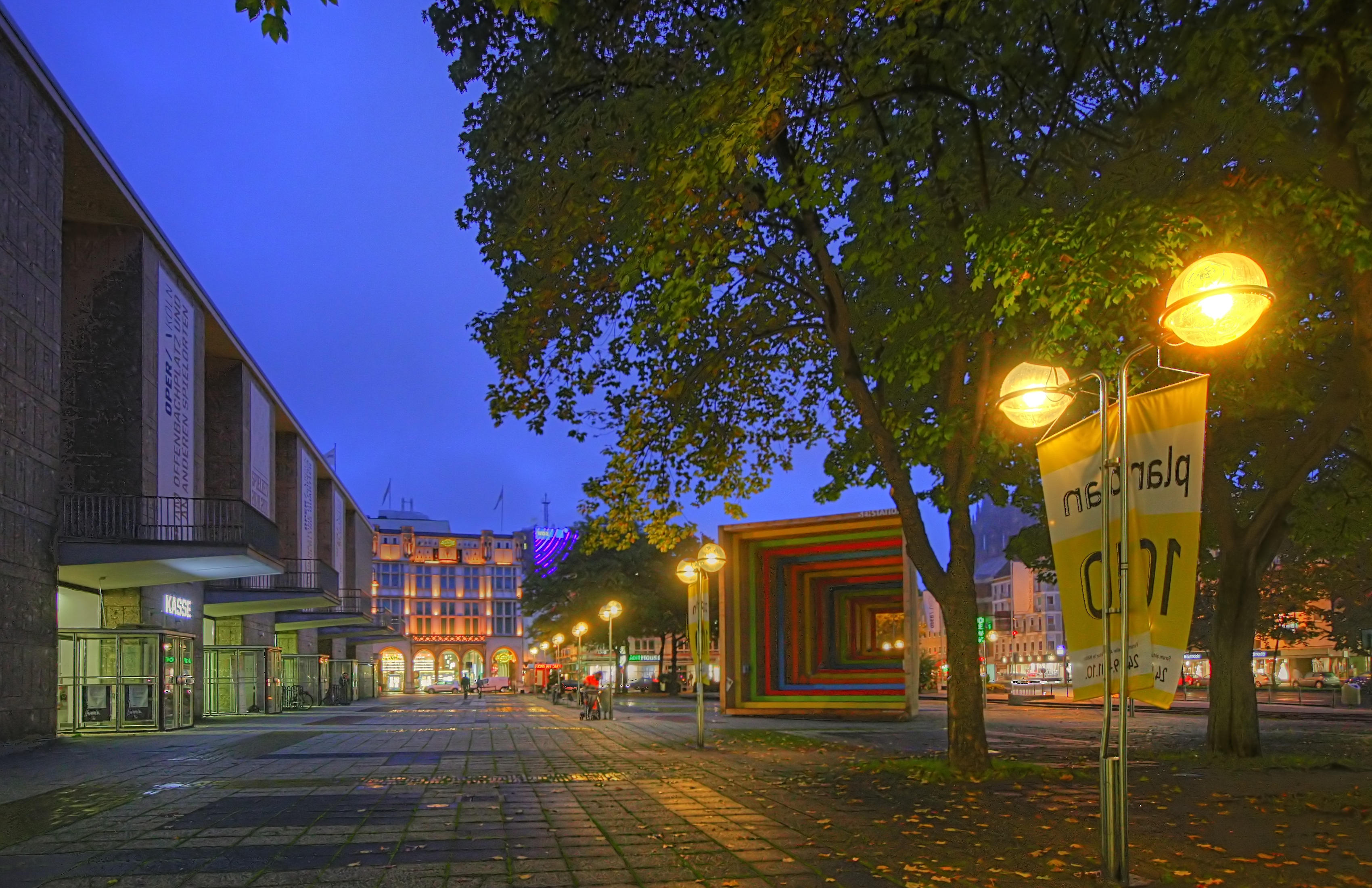 Offenbachplatz am Abend: Links die Eingangstüren in das Kölner Opernhaus, in der Mitte die SEHSTATION.